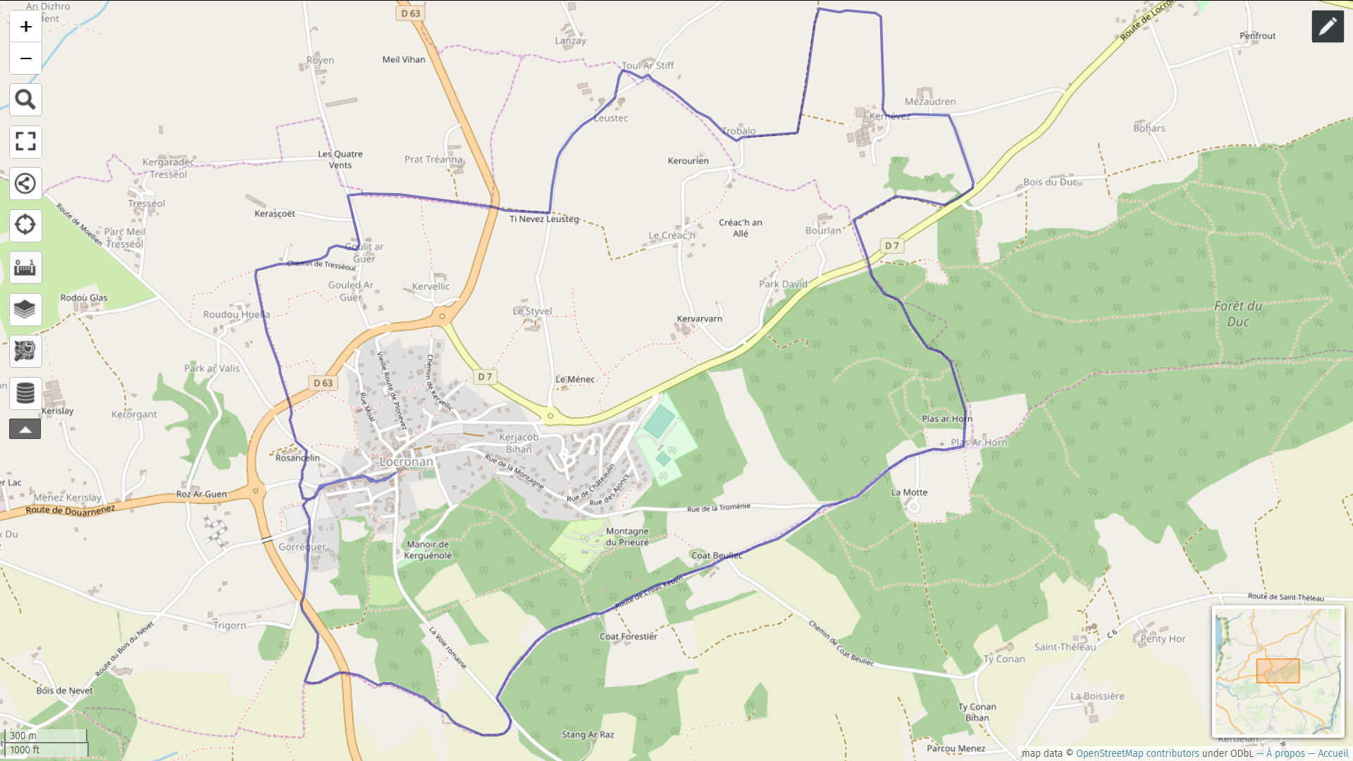 Parcours de la grande troménie de Locronan. Randonnée du 16 juillet 2019.Carte interactive.